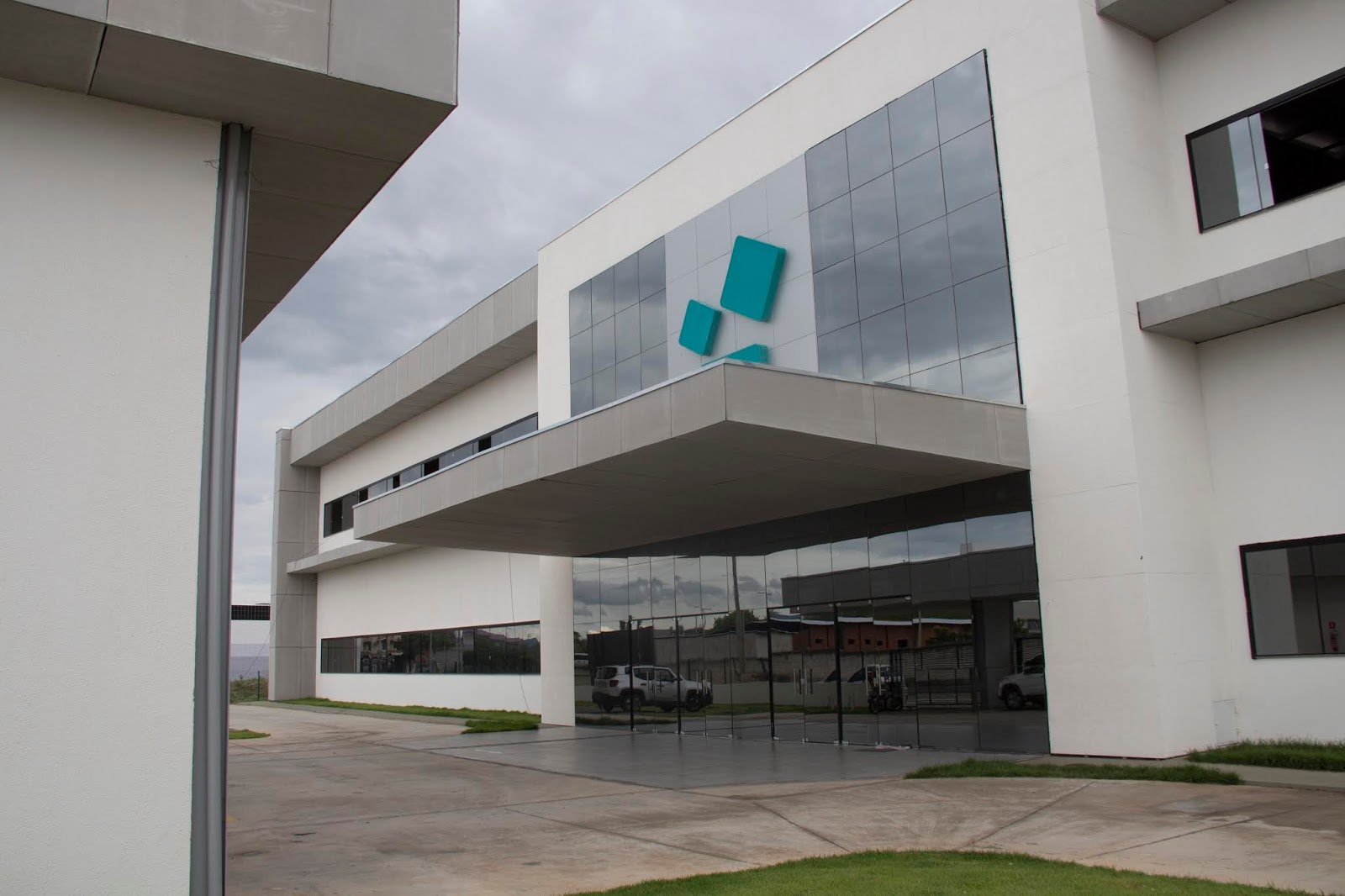 FIPGuanambi